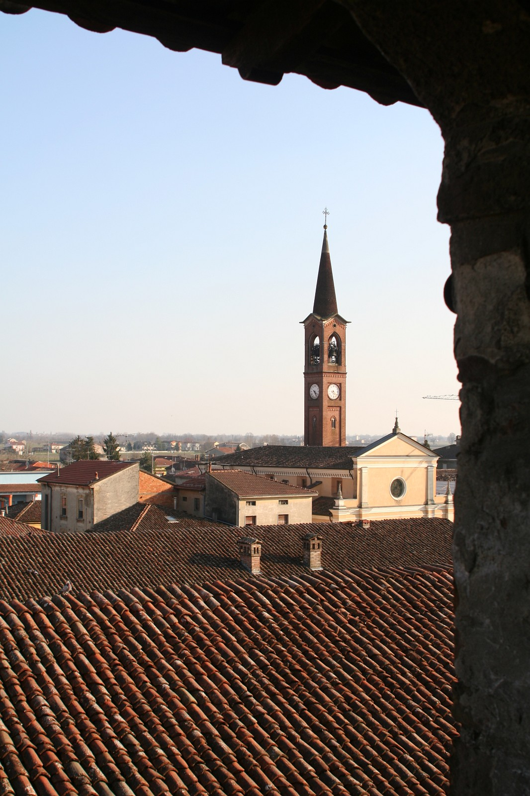 Roccabianca, Emilia Romagna, Italia